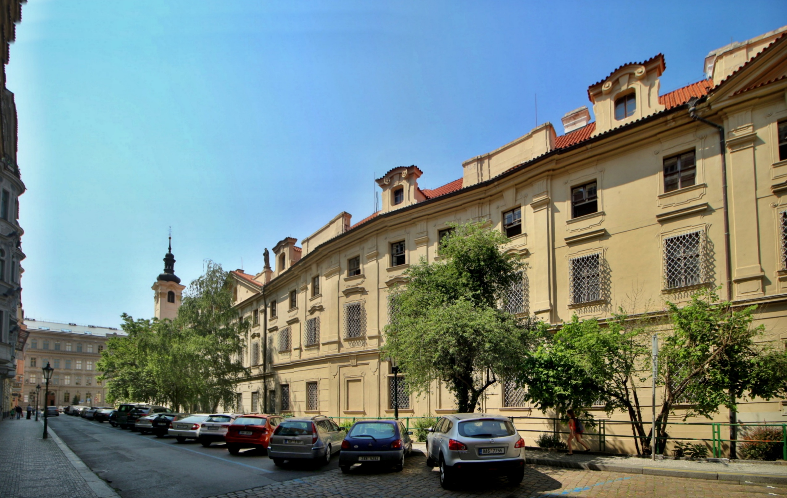 Klášter milosrdných bratří Na Františku